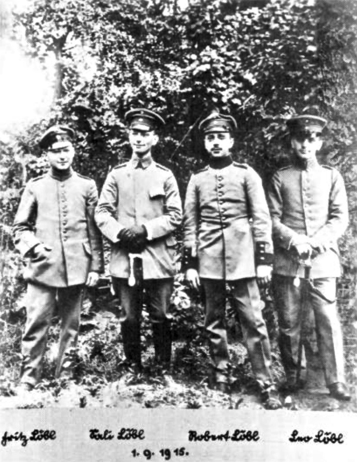 Die Brüder Fritz Siegfried (* 8. April 1886 in Bamberg; † 22. November 1956 ebenda), Salomon „Sali“ (* 4. November 1890 in Bamberg; † 4. Juni 1944 in Quito Canton, Pichincha, Ecuador), Robert (* 15. Oktober 1892 in Bamberg; † 12. Mai 1949 in Birmingham) und Leopold „Leo“ Löbl (* 16. August 1887 in Bamberg; † 1943 ebenda) während des Ersten Weltkrieges. Der fünfte Bruder Eugen (* 29. September 1888 in Bamberg; † 16. März 1889 ebenda) verstarb bereits als Kleinkind.